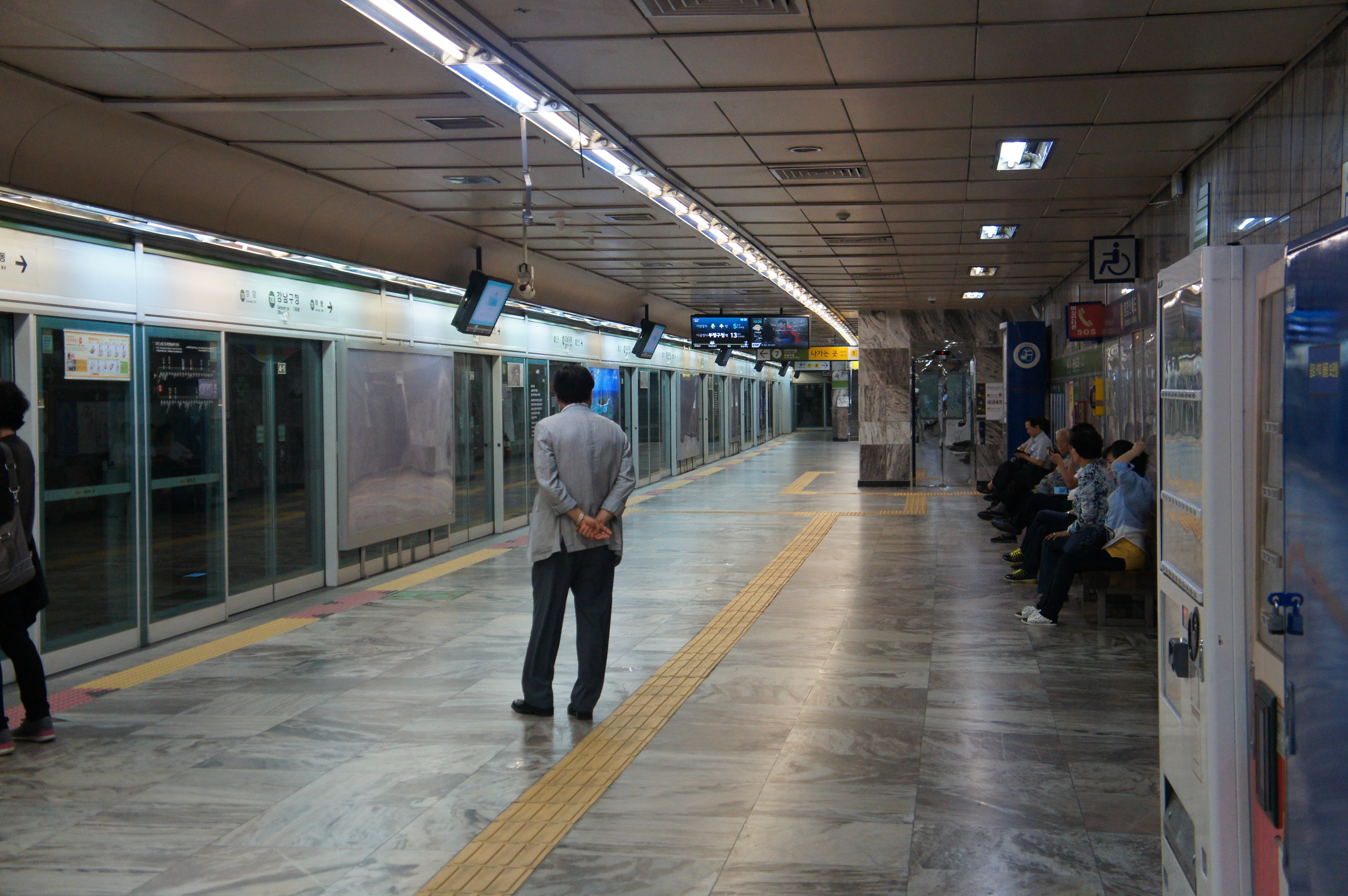 7호선 강남구청역 승강장